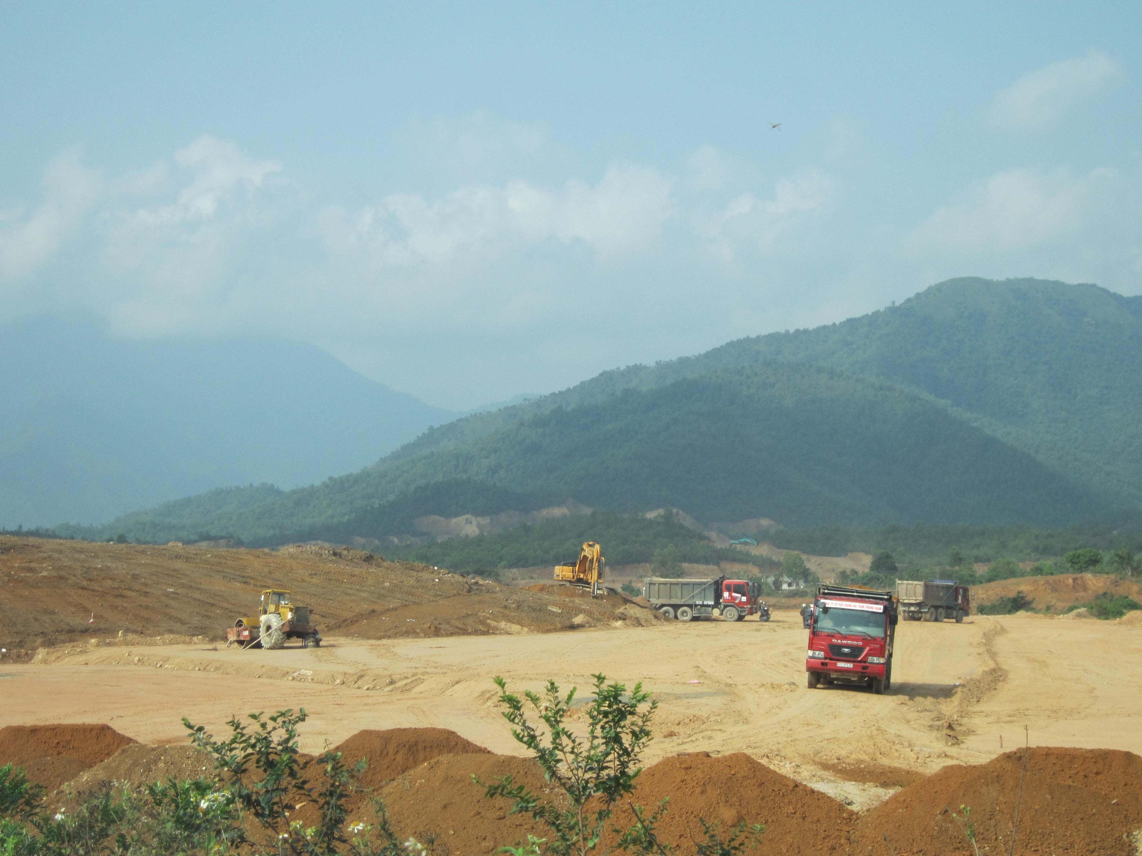 KCNC đang trong giai đoạn san lấp mặt bằng